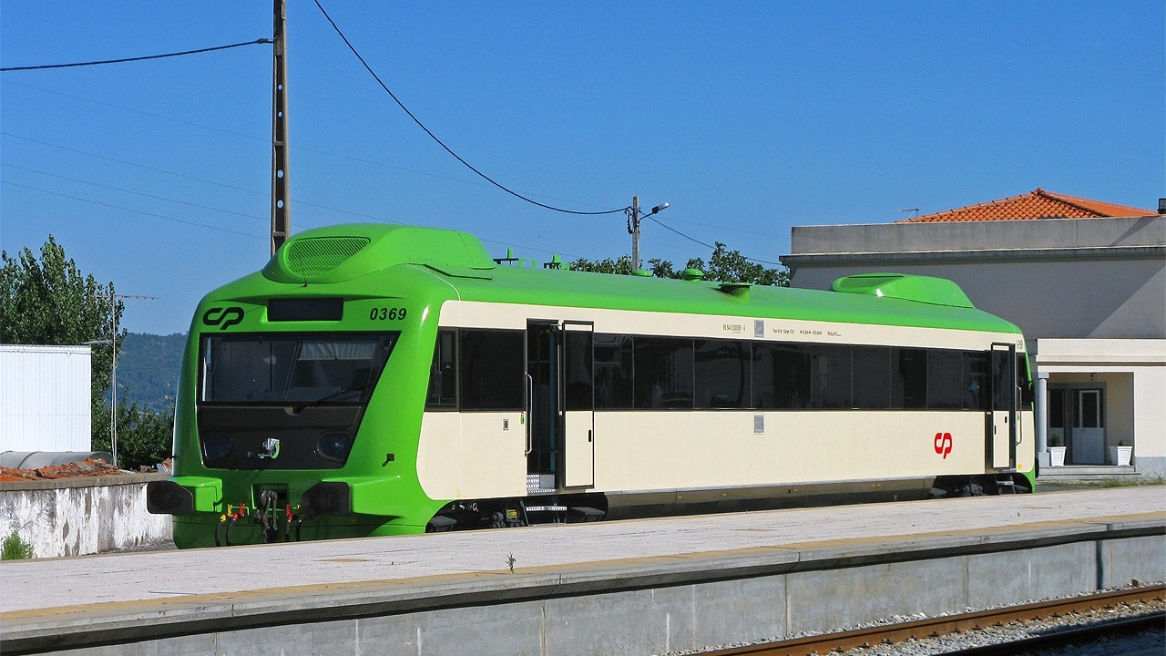 Automotora Allan 0369 com a nova "decoração" da CP. Covilhã, 30 Jul 2009